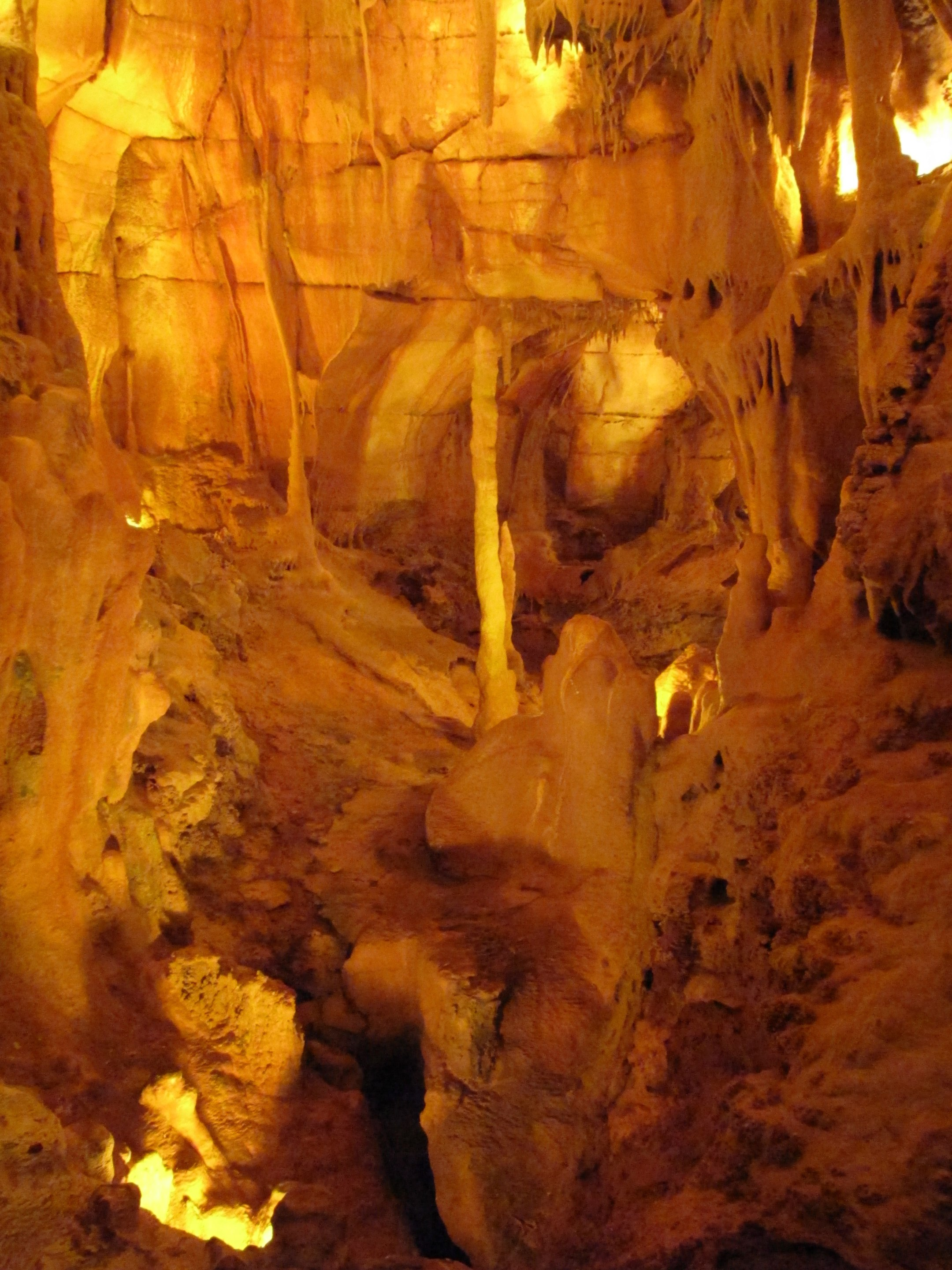 Grutas da Moeda